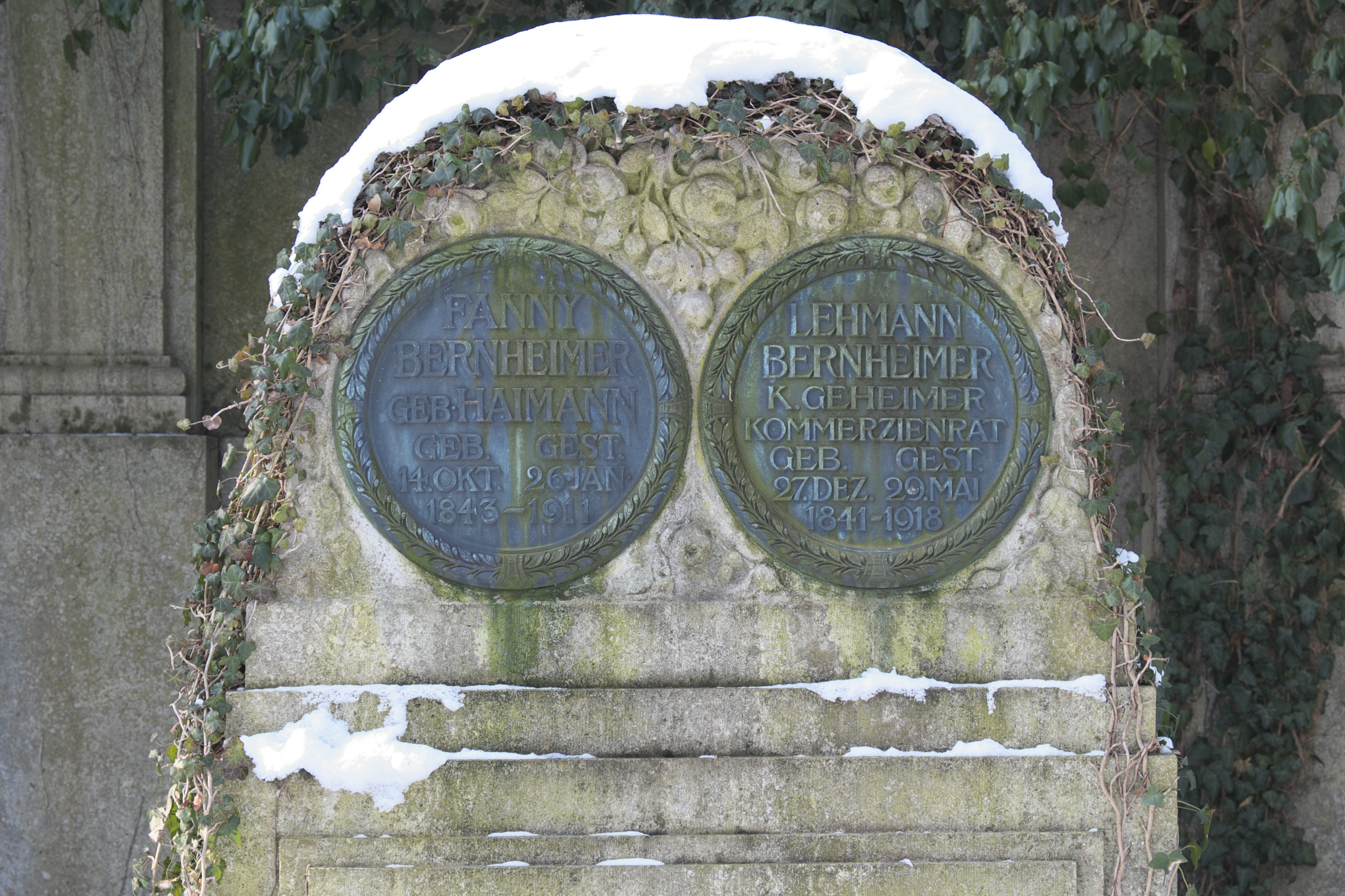 Grabstein für Lehmann Bernheimer, Neuer Israelitischer Friedhof im Stadtteil Freimann (Stadtbezirk Schwabing-Freimann) in München (Bayern/Deutschland)